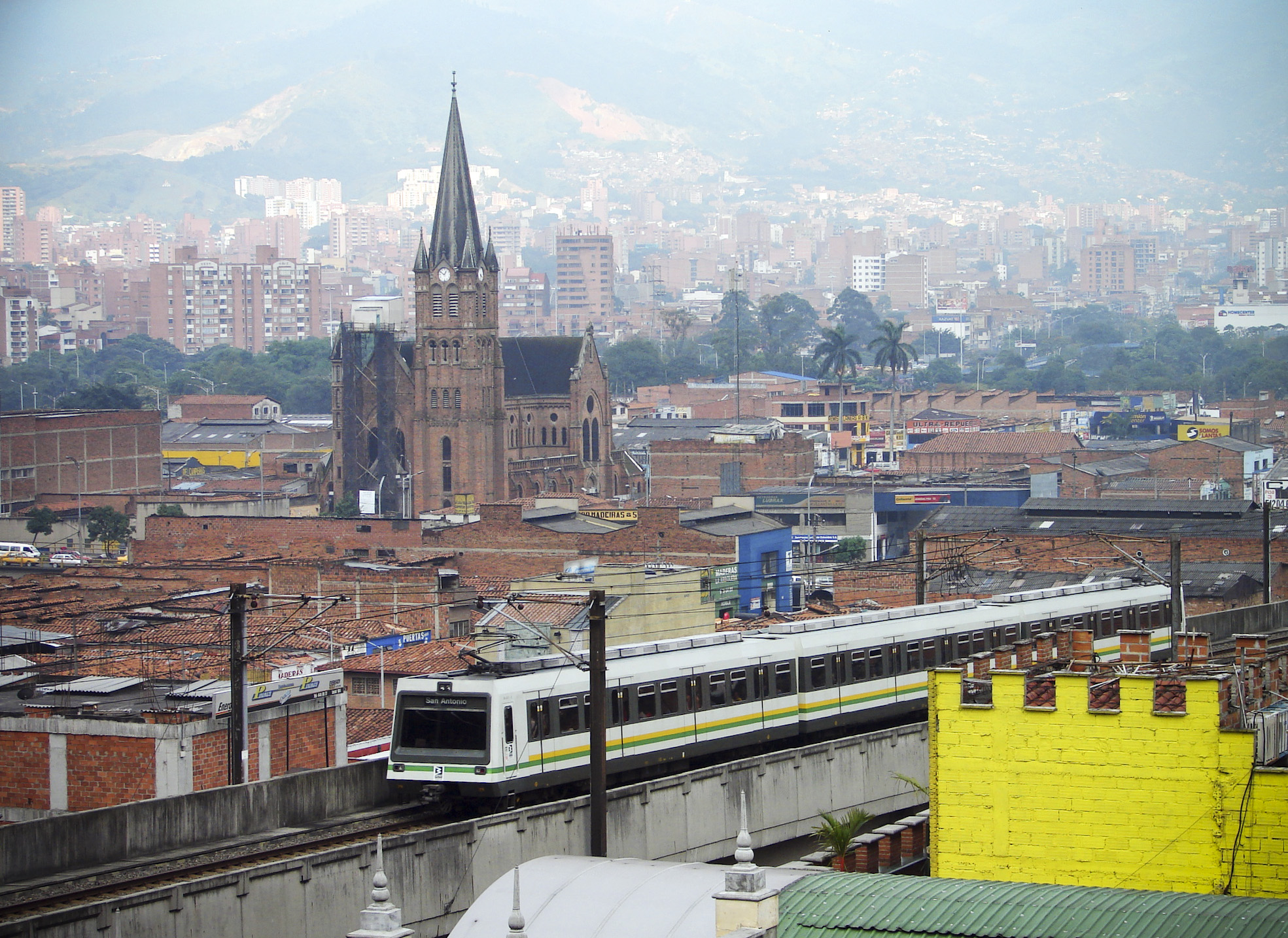 Metro de Medellín